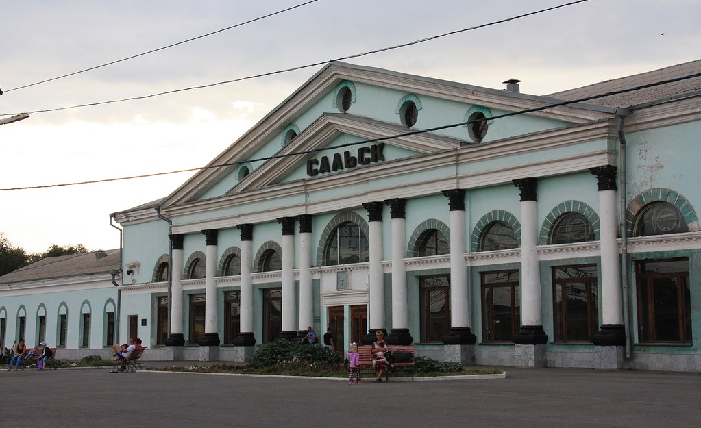 Железнодорожный вокзал станции Сальск